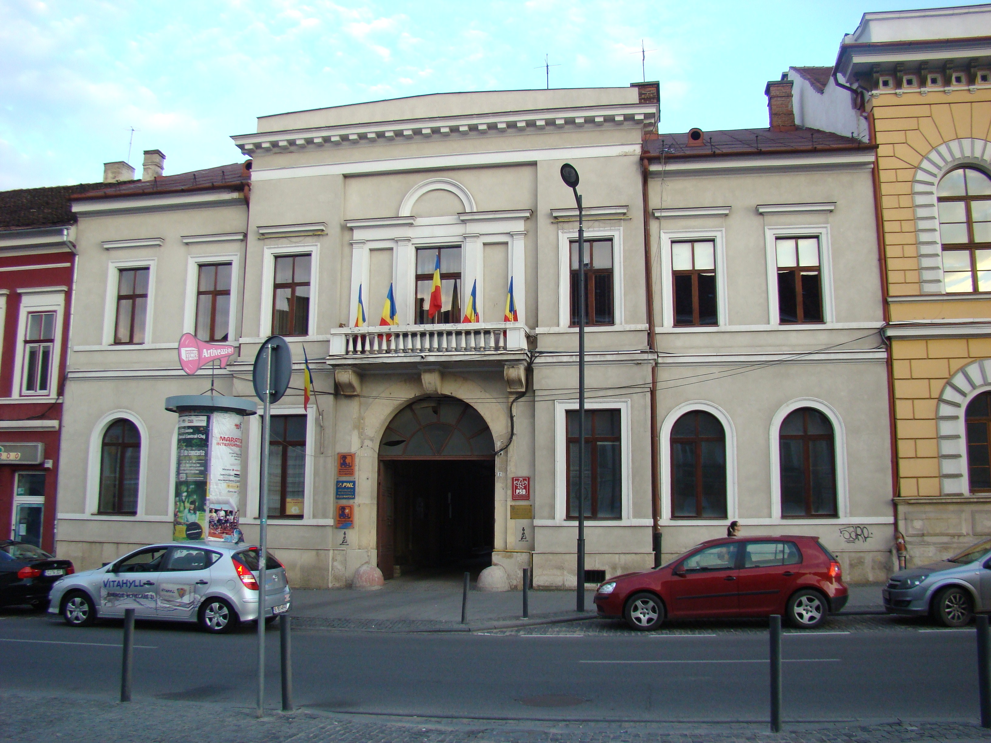 Clădire monument istoric, Bd.Eroilor, nr.2